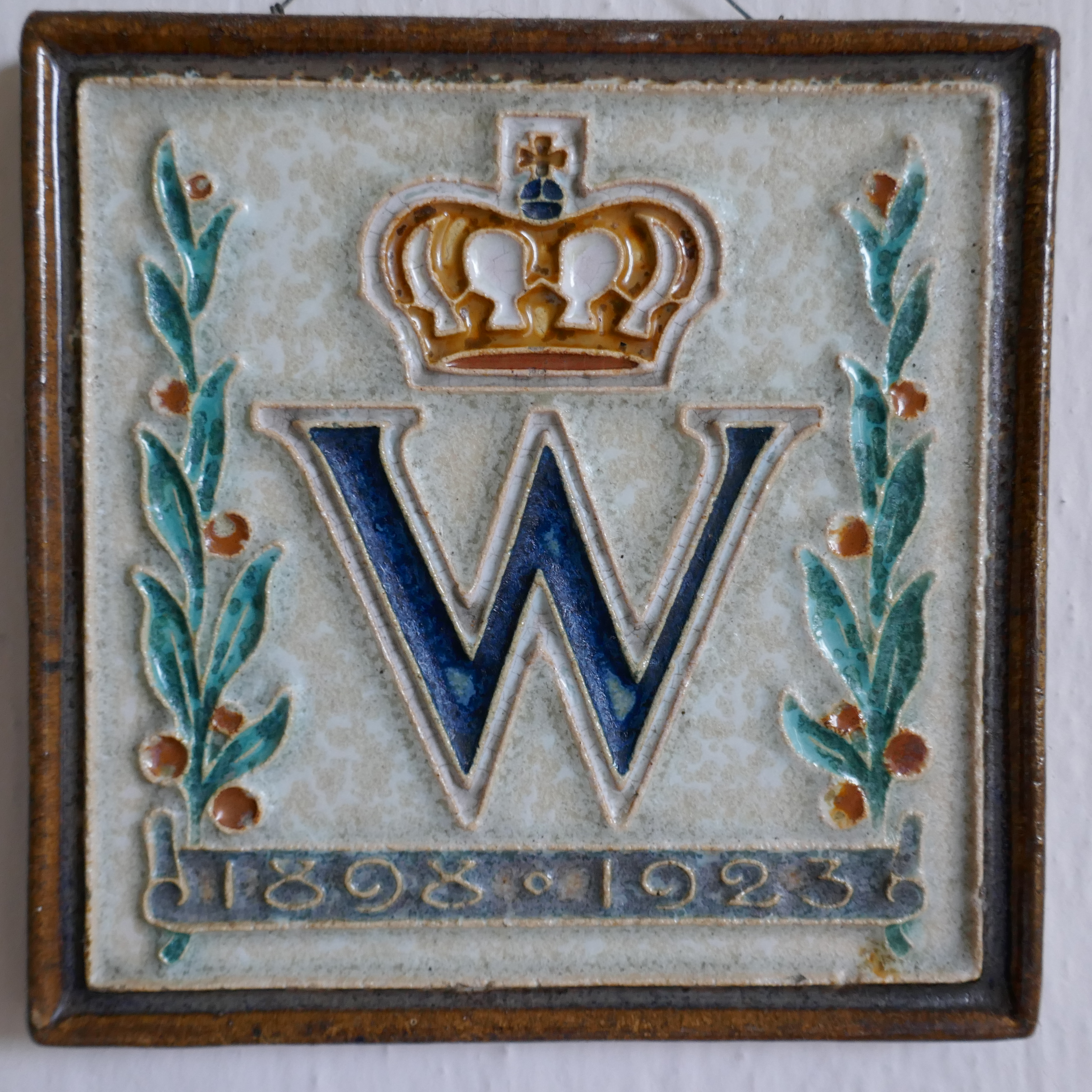 Cloisonné-tegel ter gelegenheid van het 25-jarig regeringsjubileum van koningin Wilhelmina gemaakt door Joost Thooft bij de Porceleyne Fles in Delft